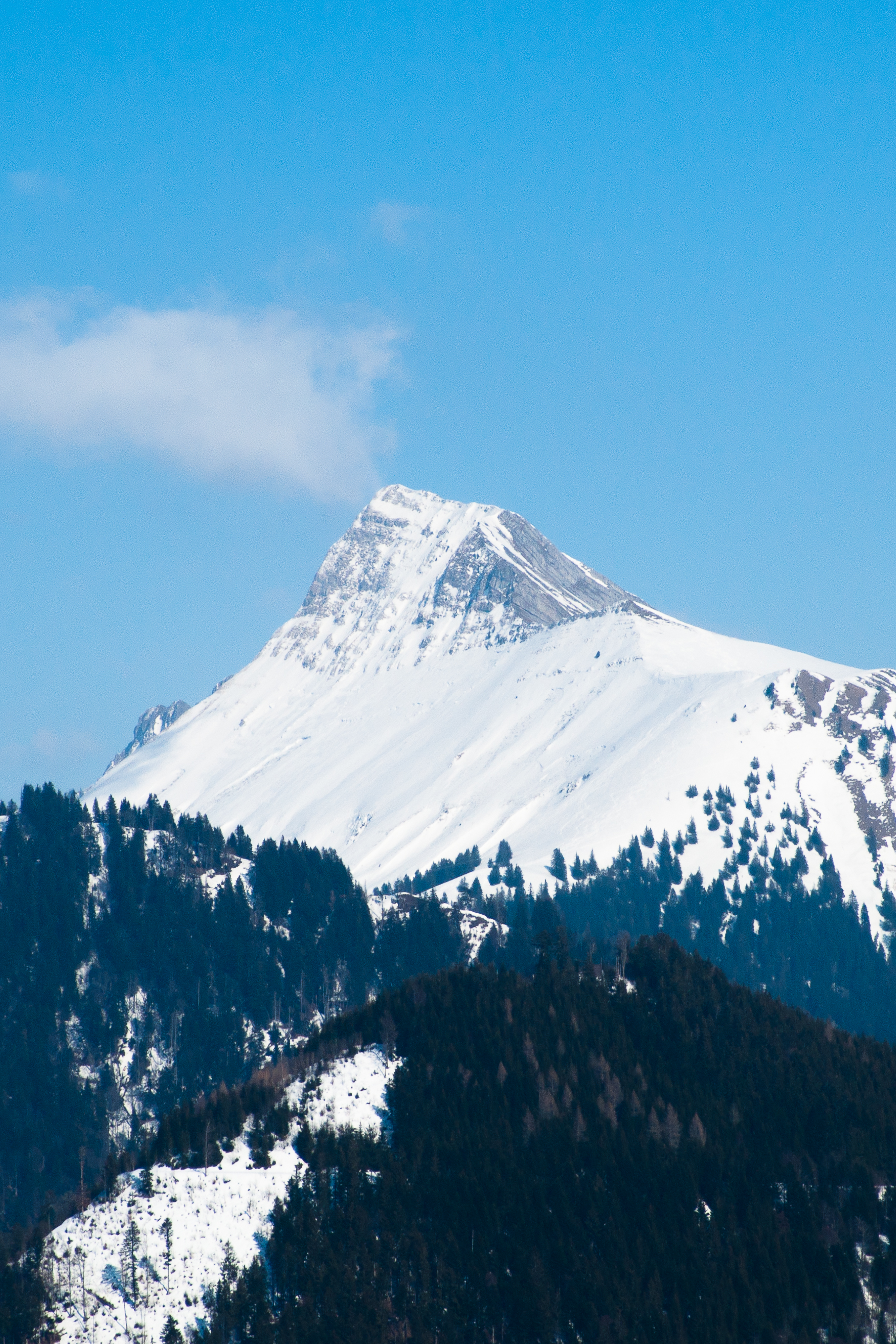 La dent de Lys vu depuis Les Pléiades